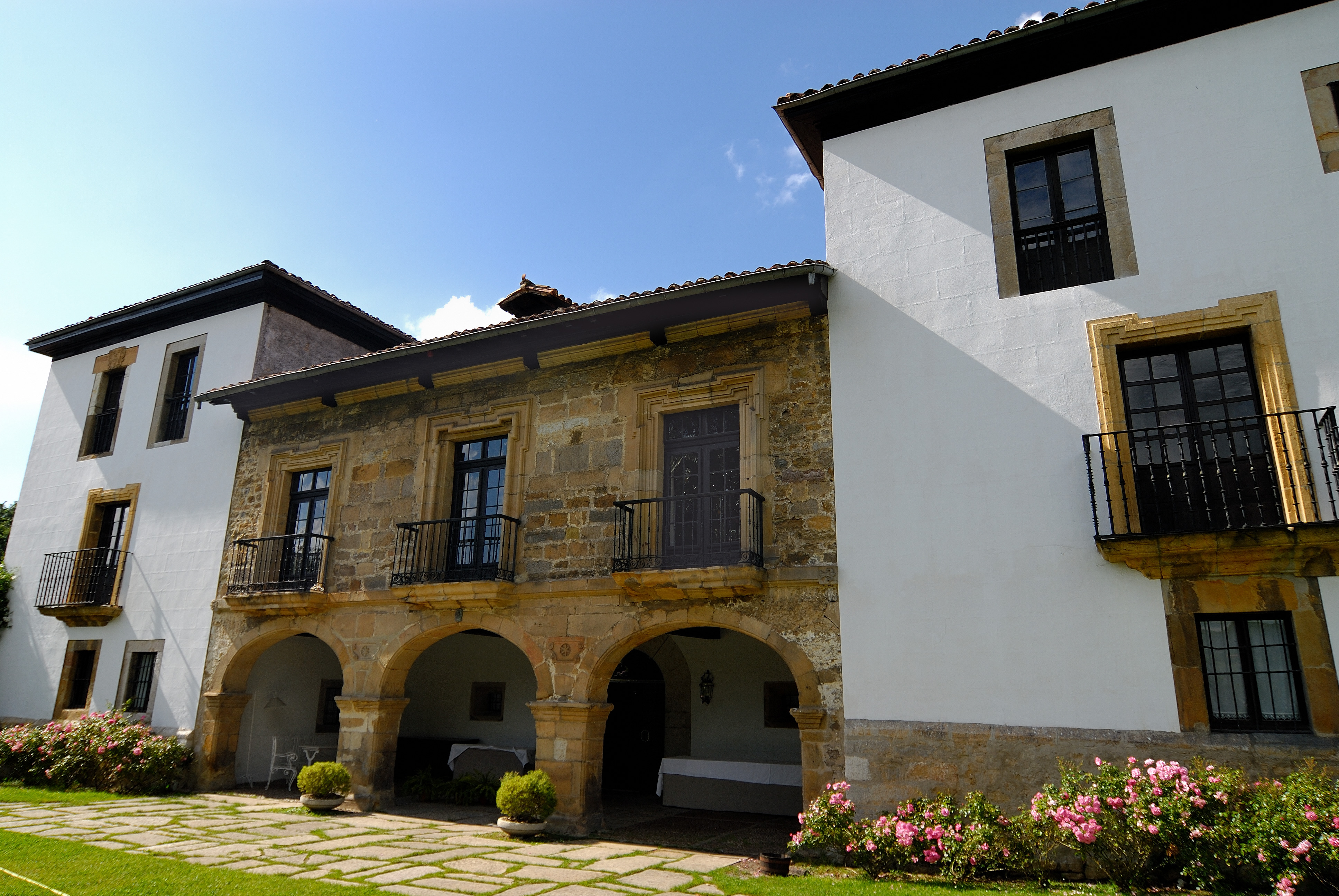 Facha principal del Palacio de Meres